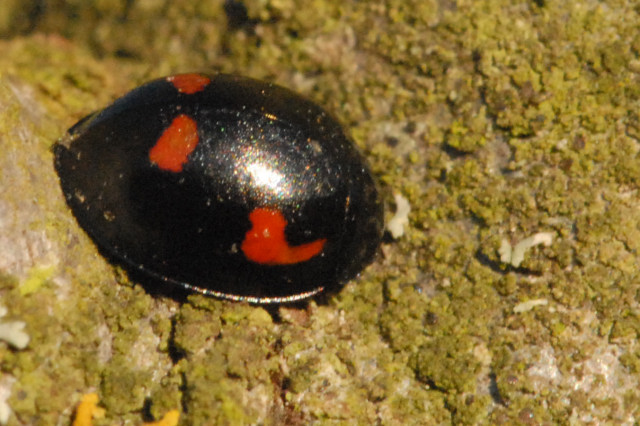 Brumus quadripustulatus from Commanster, Belgian High Ardennes .